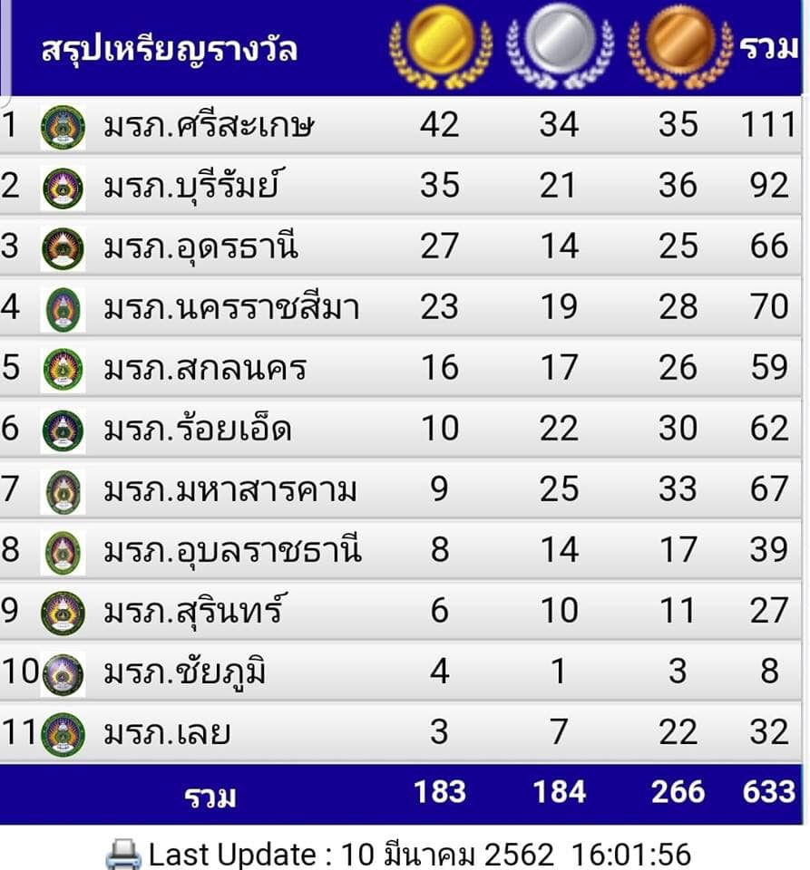 พนมรุ้งเกมส์บุรีรัมย์